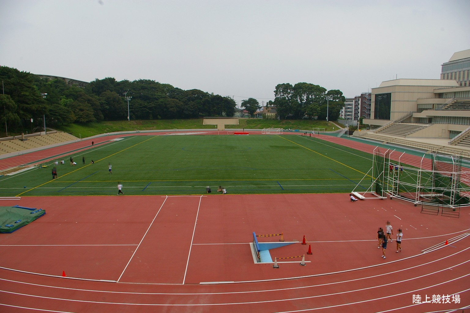 2009.5日本国内で塾生 (talk)が撮影。